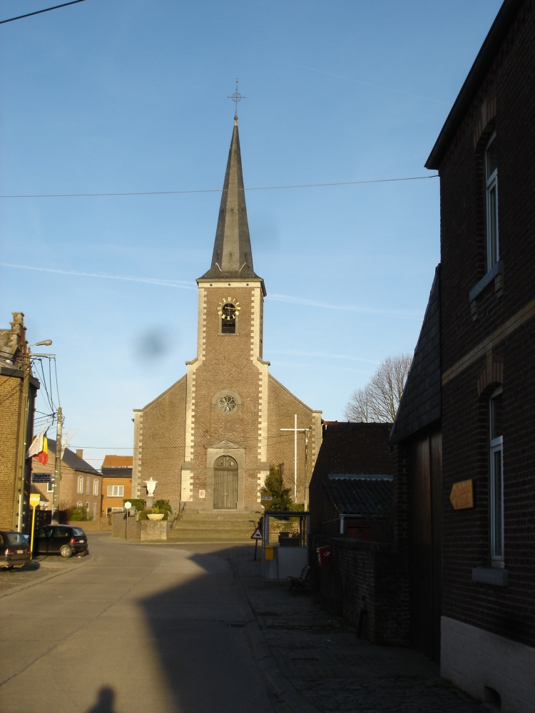 Eglise de Thorembais les béguines